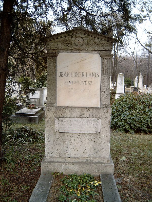 Deák Ébner Lajos sírja Budapesten. Kerepesi temető: 34-2-36.